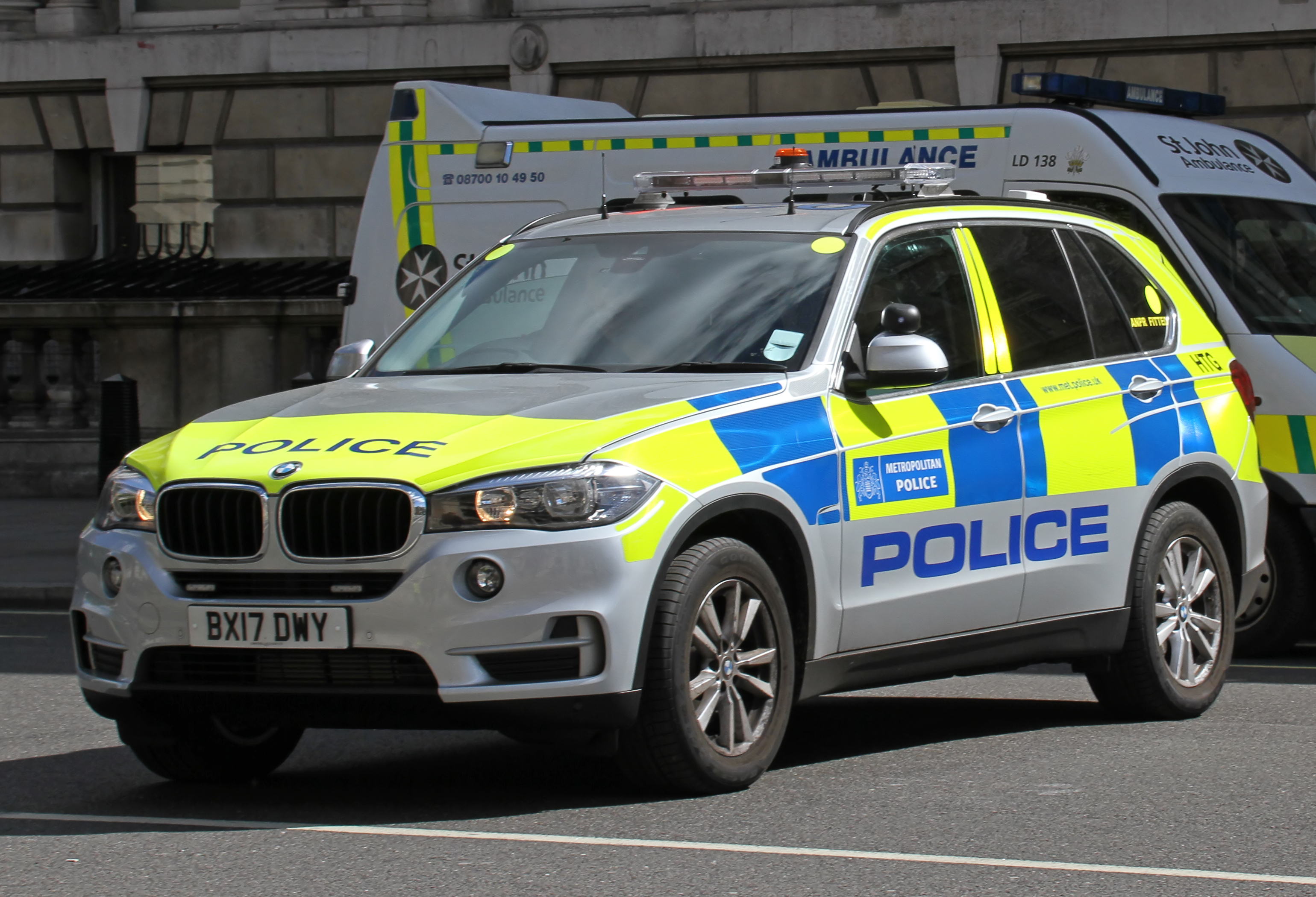 Police BMW X5